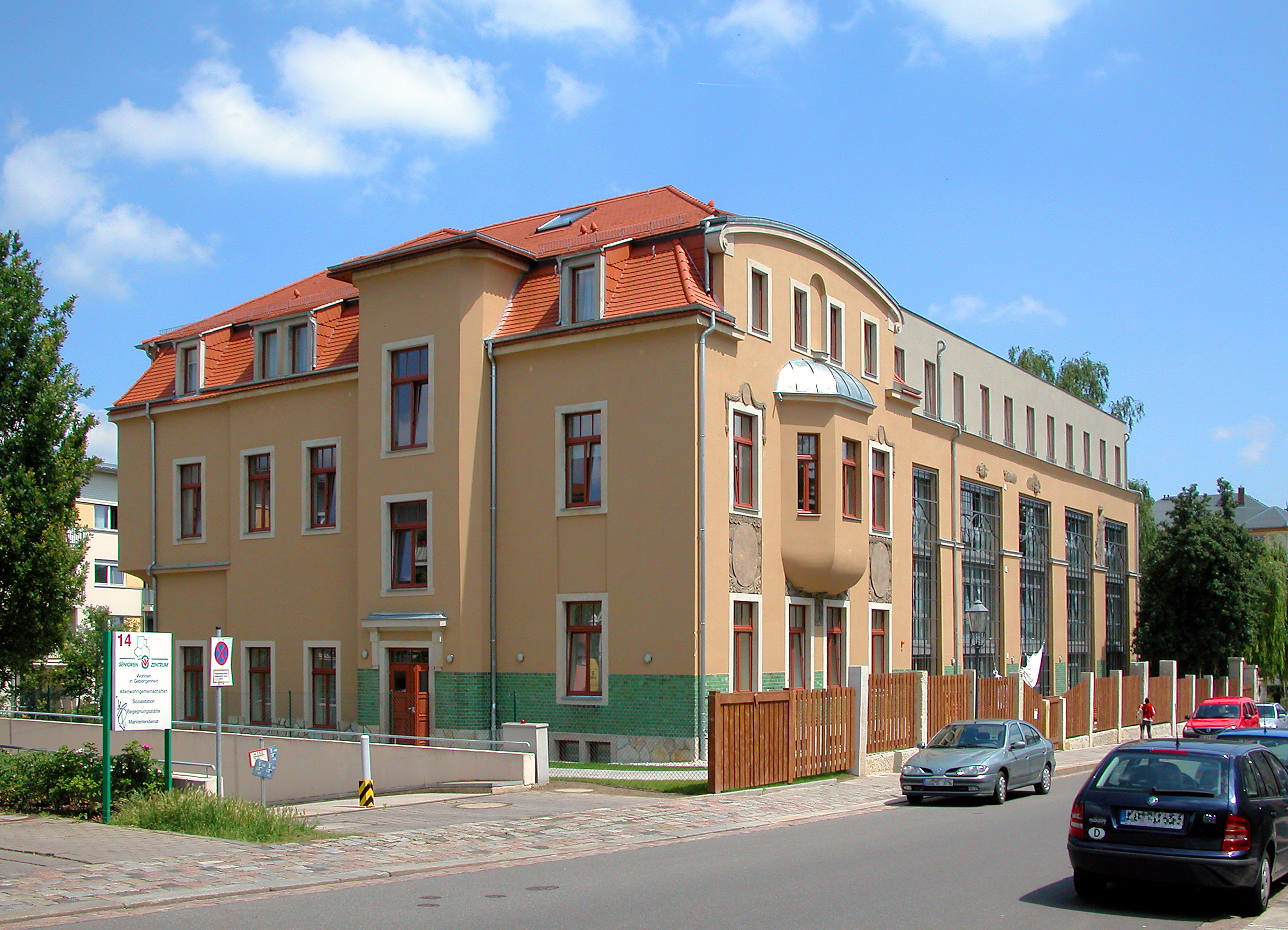 17.06.2009 01159 Dresden-Löbtau, Mohorner Str. 12 (GMP: 51.035175,13.700198): Die vormalige Ruine des 1899 für die Kunstgießerei Pirner und Franz (Glockengießerei) errichteten Gebäudes wurde 2008/09 denkmalgerecht saniert. Heute ist hier eine Seniorenresidenz für Demenzkranke. [DSCN37967.TIF]20090617050DR.JPG(c)Blobelt